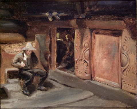 Norwegian: Setesdalsstue med to dører.title QS:P1476,no:"Setesdalsstue med to dører." label QS:Lno,"Setesdalsstue med to dører."